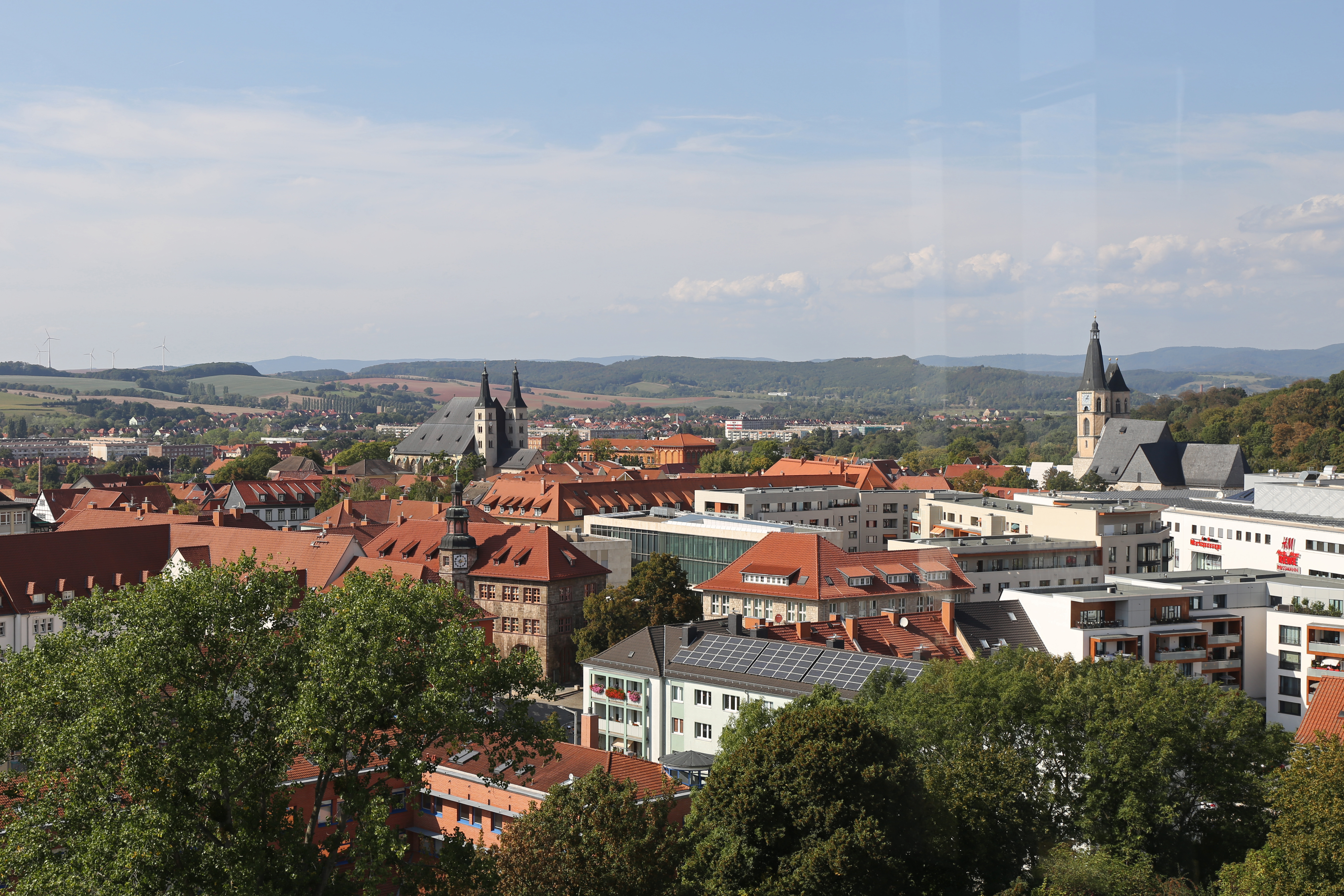 Blick vom Petri-Turm auf das Stadtzentrum von Nordhausen am Harz u. a. mit dem Nordhäuser Dom, Rathaus, Stadtbibliothek, Stadthaus, Blasiikirche